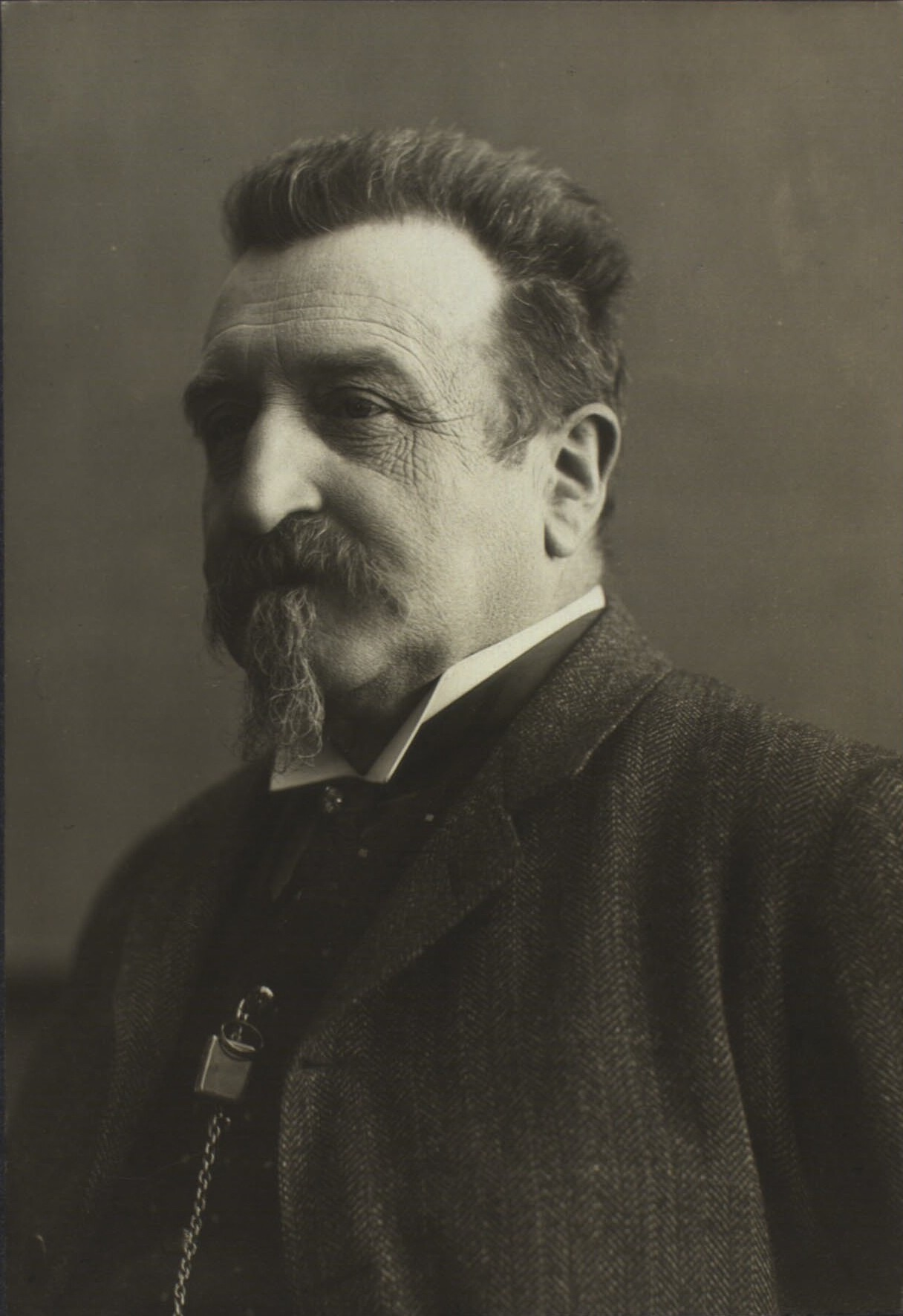 Fotografi